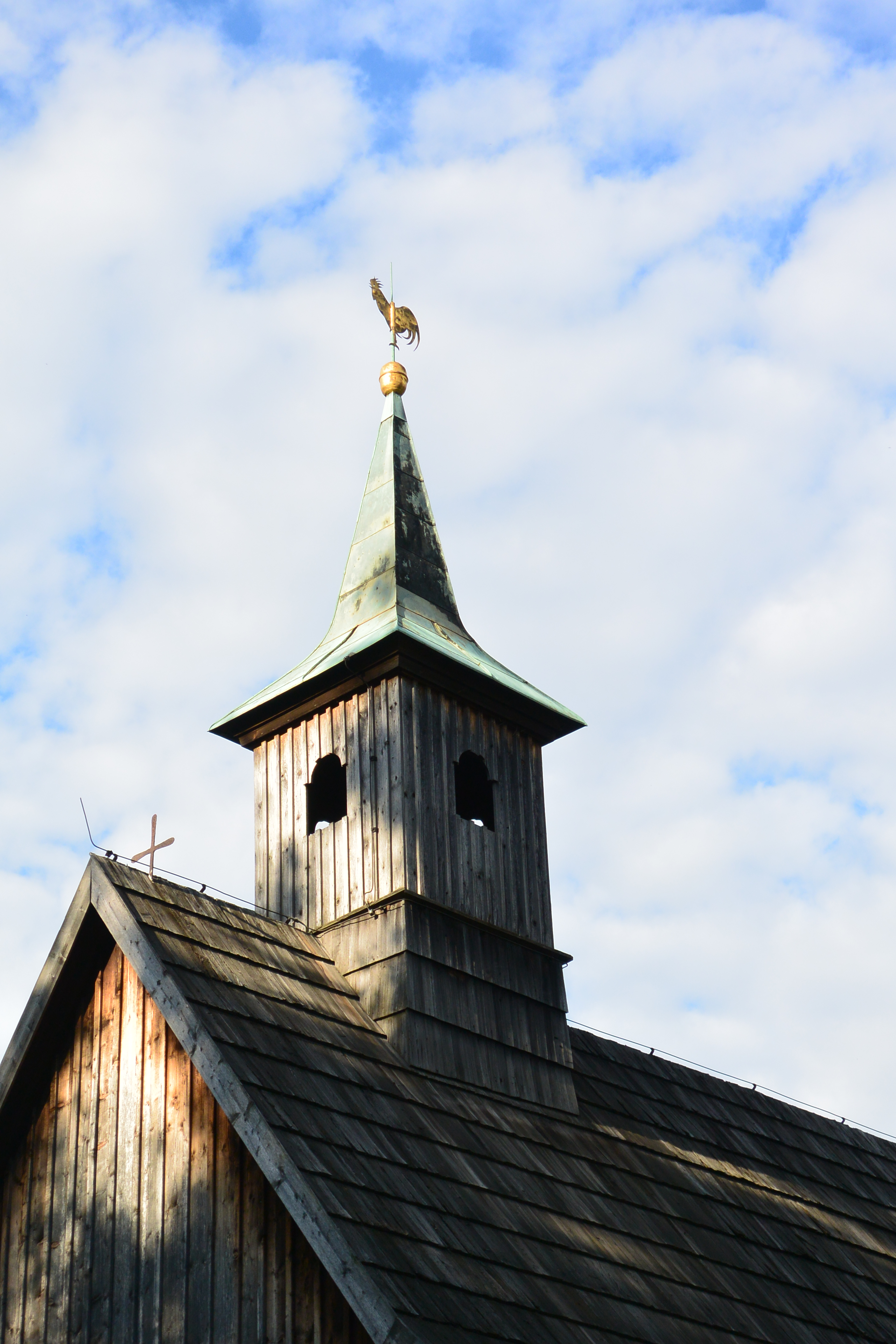 Dachreiter der Schrotholzkirche (denkmalgeschützte Kapelle) in Sprey